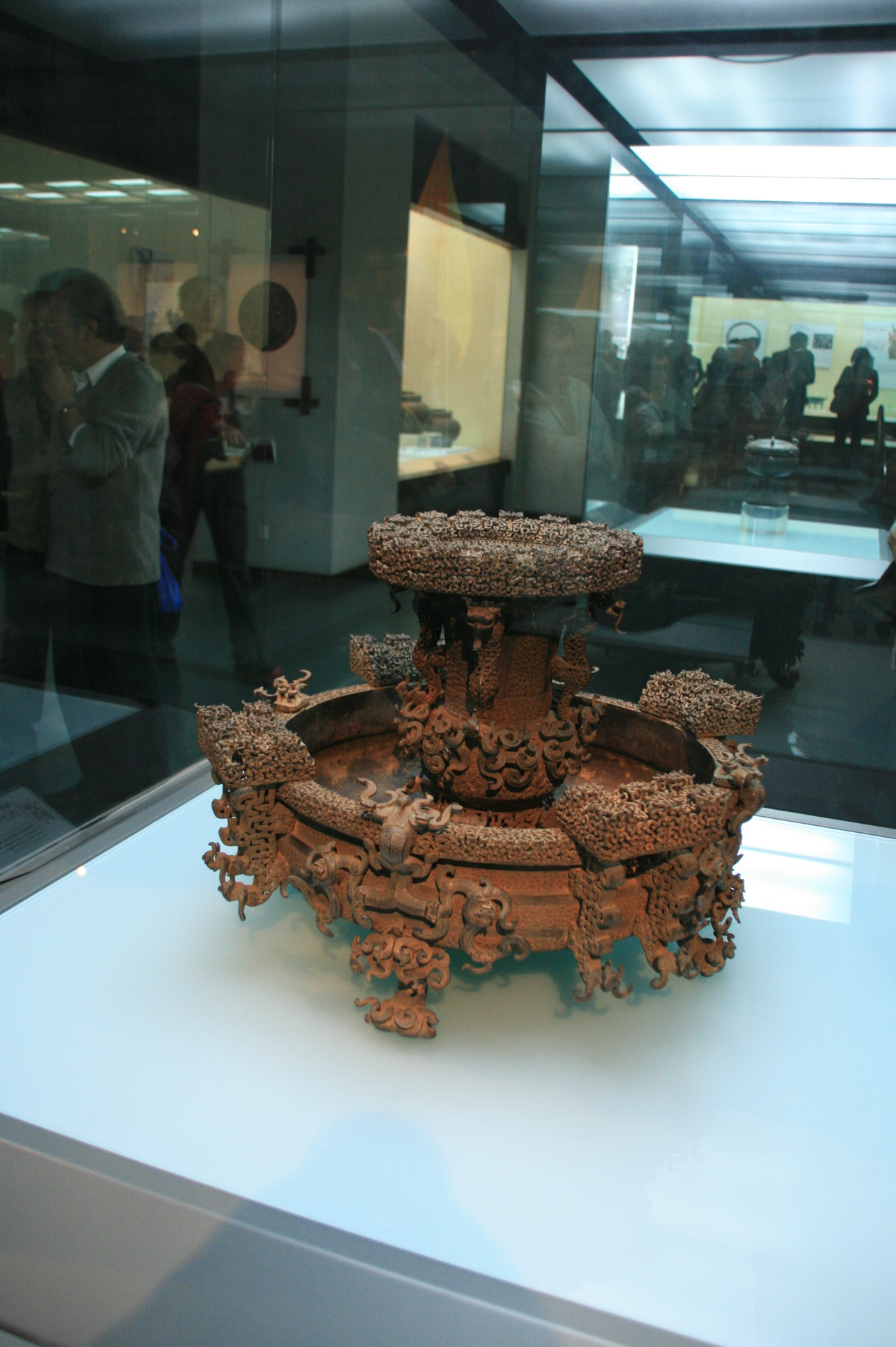 武汉辛亥革命辩论赛 070